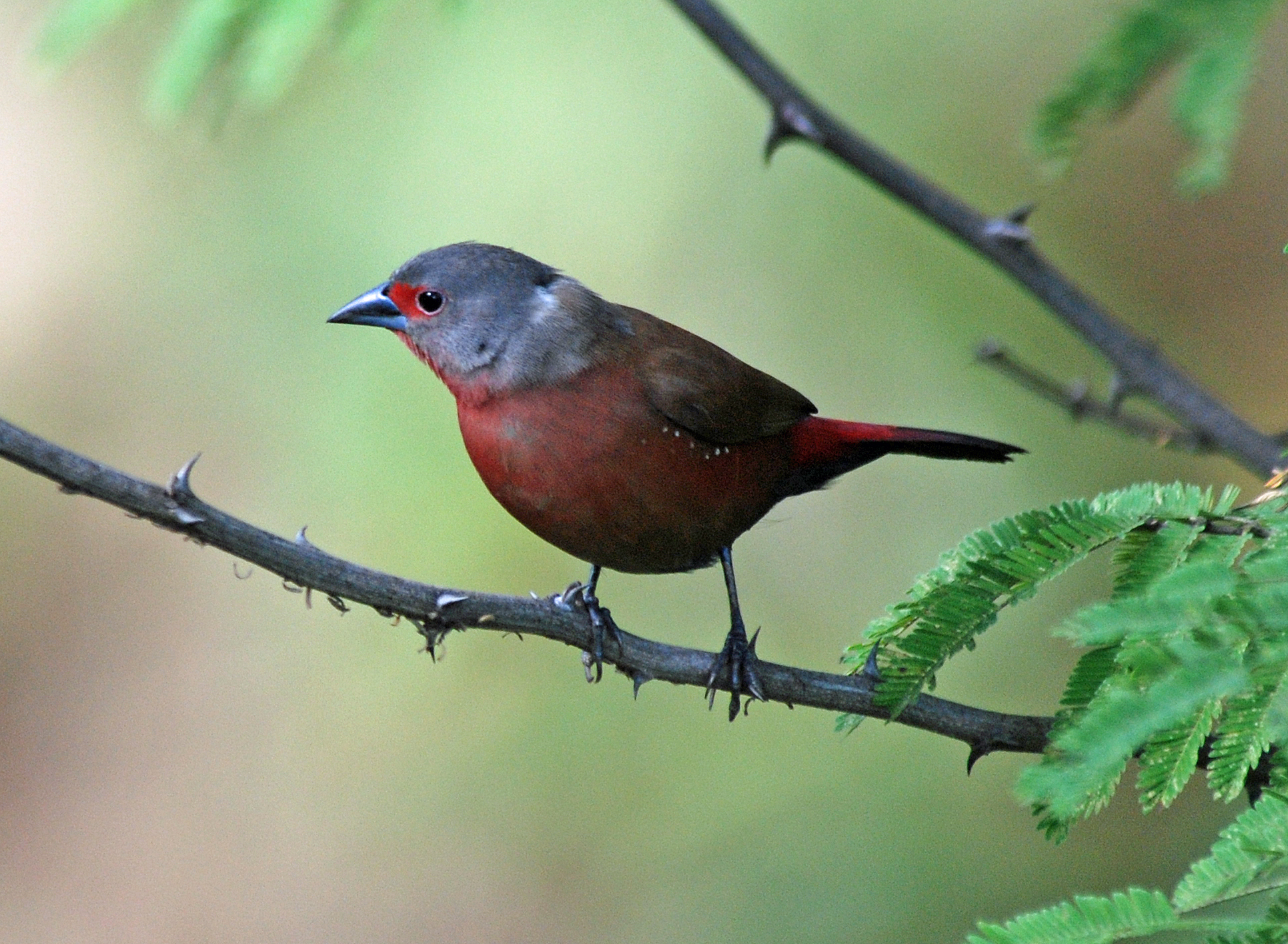 Female